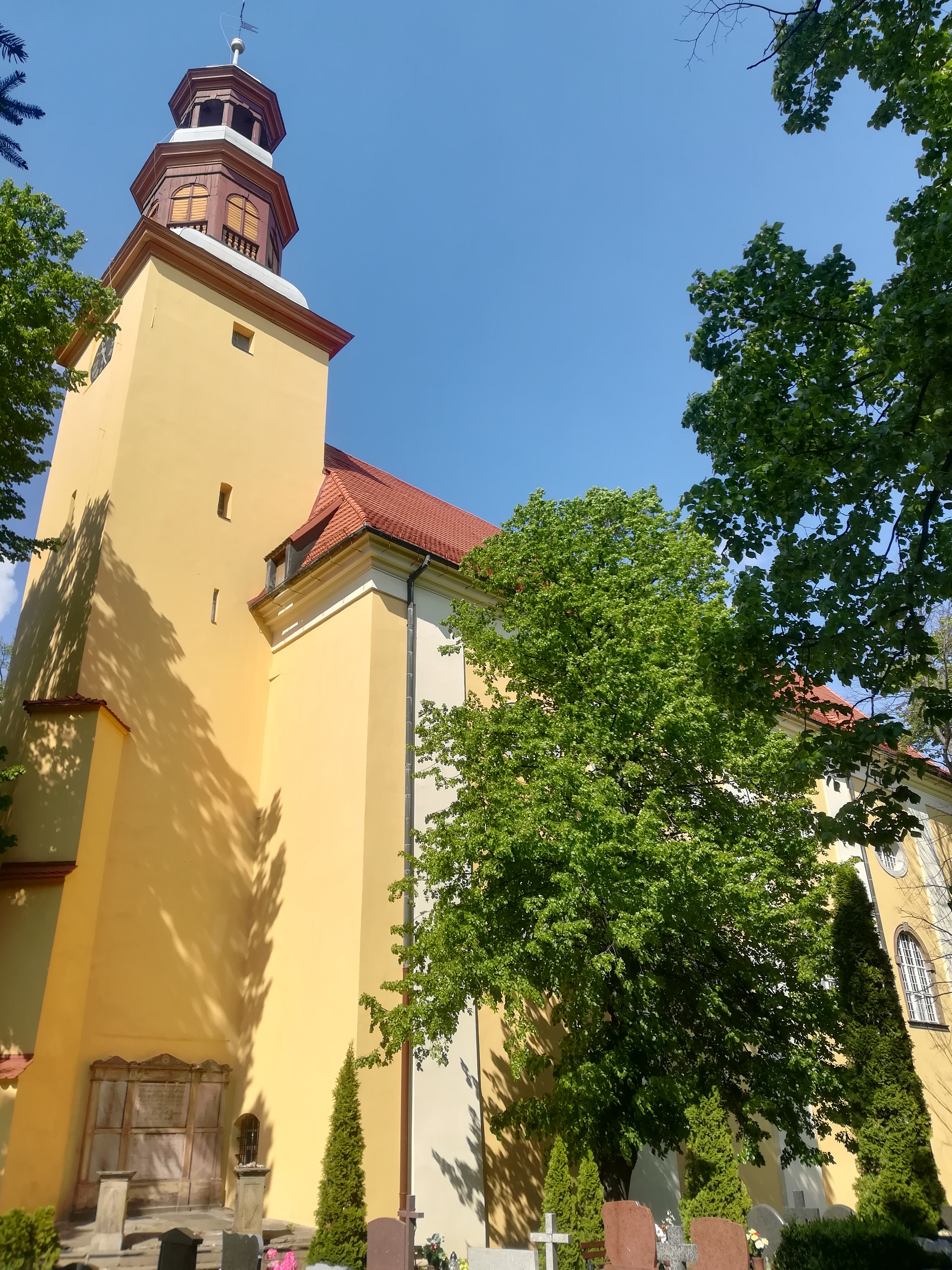 Kościół św. Józefa Oblubieńca - Stare Bogaczowice.